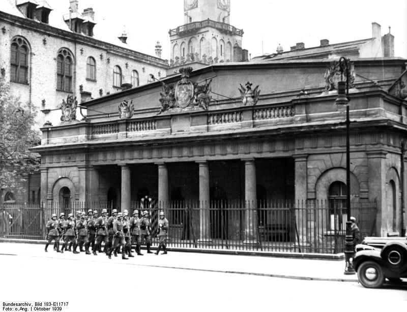 Posen, Alte Wache Aus dem befreiten Posen. Die Alte Wache am Altrn Markt. Fot. Ho. 21.10.39 12555-39 [Polen, Posen.- Gruppe marschierender Soldaten vor der Alten Wache.] Information added by Wikimedia users.